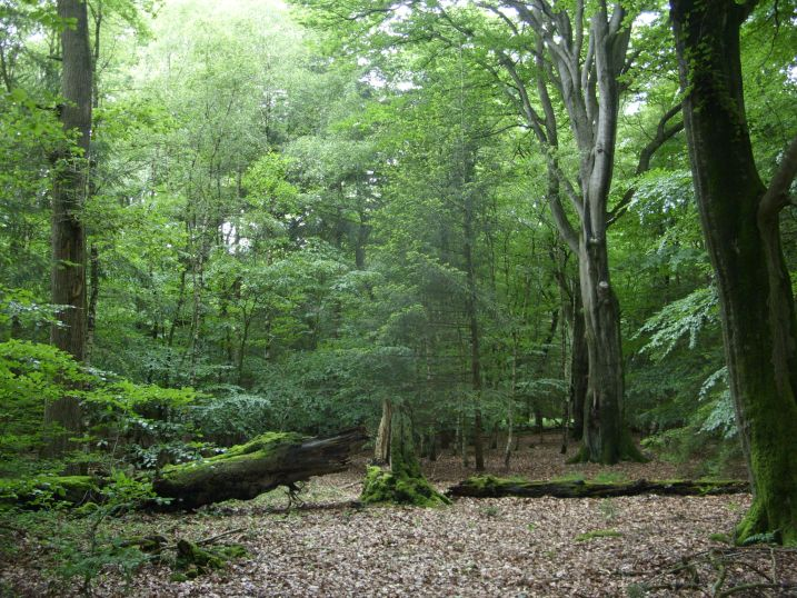 Naturschutzgebiet „Baumweg“